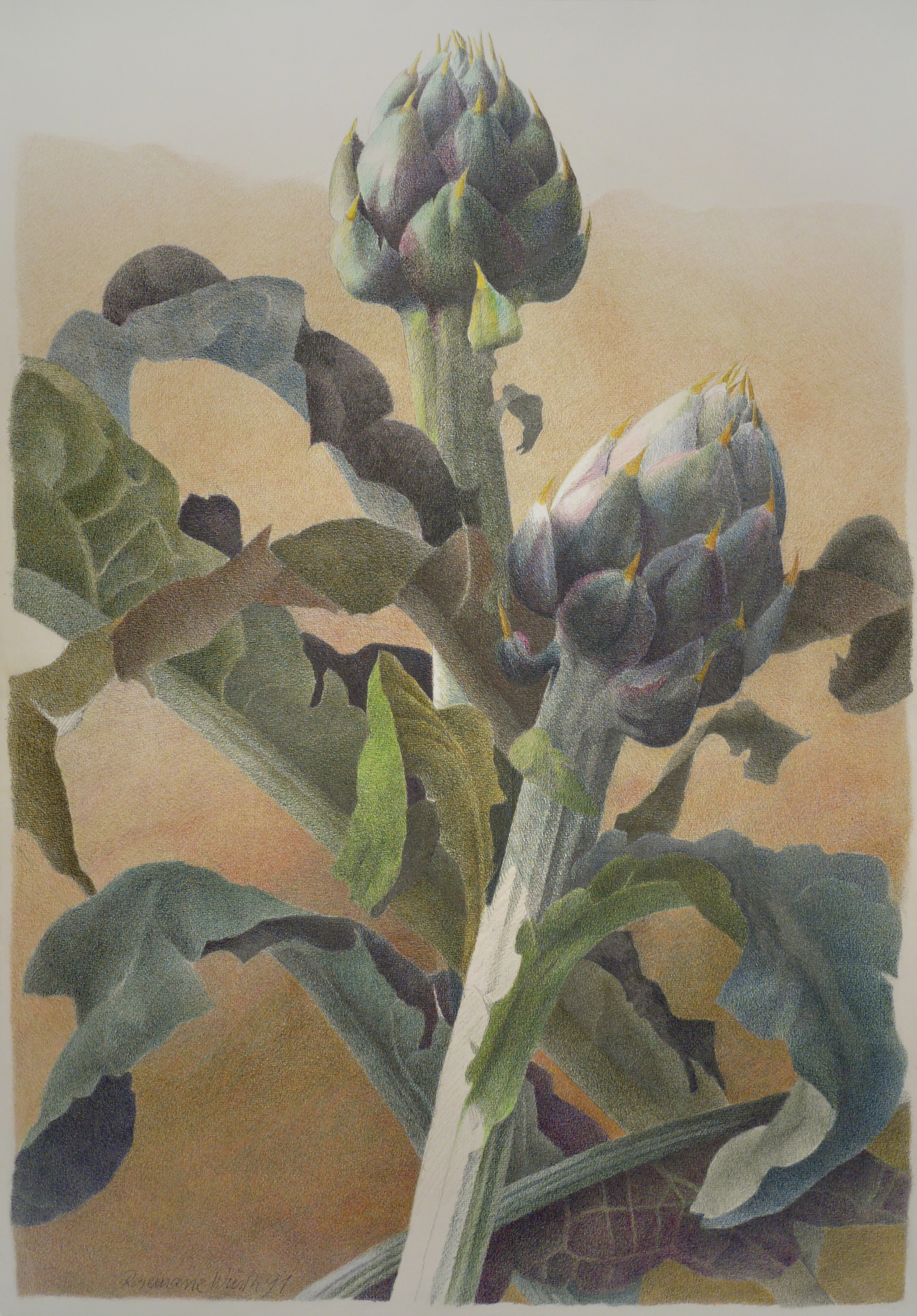 Zeichnung der Künstlerin Rosemarie Würth, Farb- und Bleistift auf Papier ...